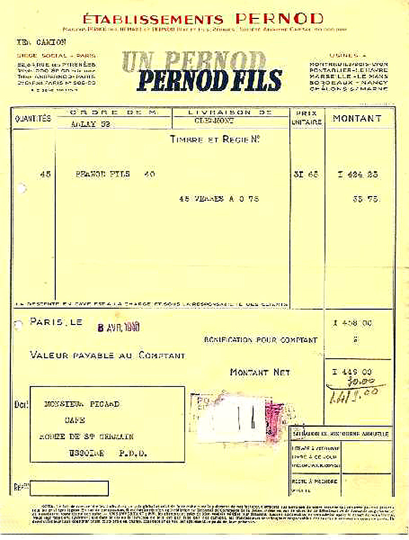 Facture Pernod fils 8 avril 1940